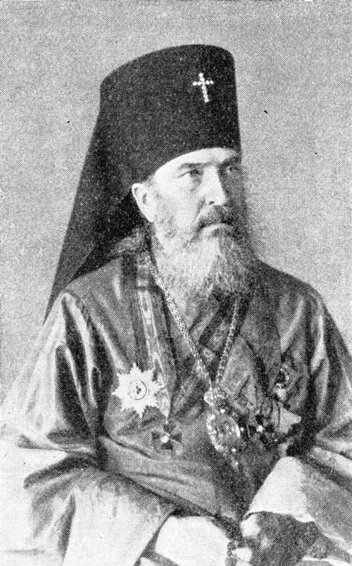 Saint Nikolai (Kasatkin). Archbishop of Japan.